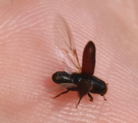 Borkenkäfer Hylurgus ligniperda am 20. März 2020 in Walldorf/Baden